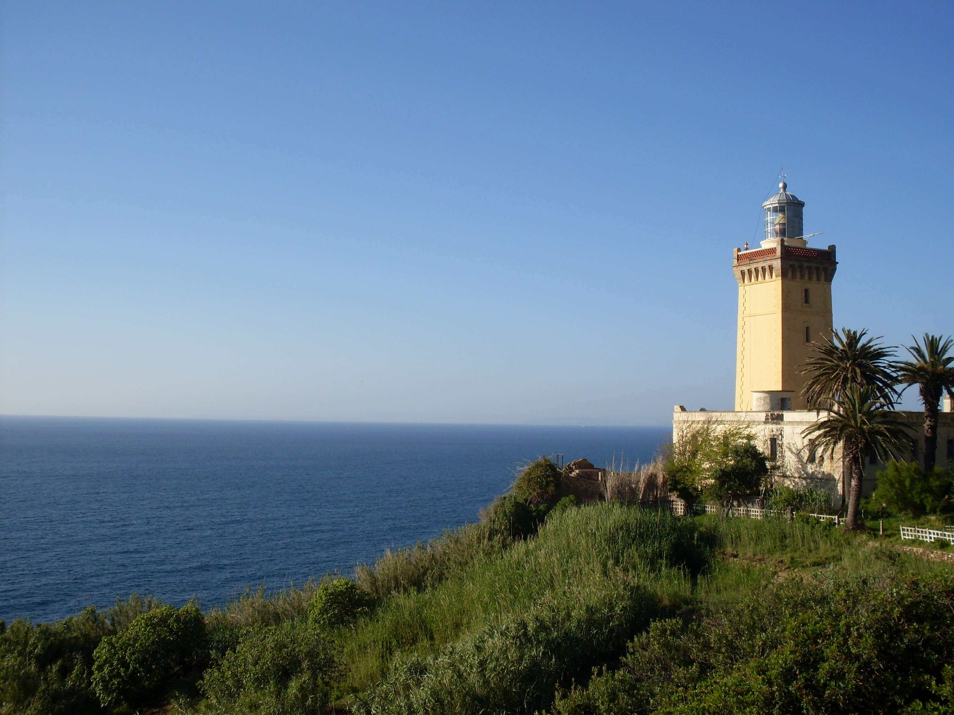 Phare dans les environ de la ville de Tangier, dit phare du Cap Spartel